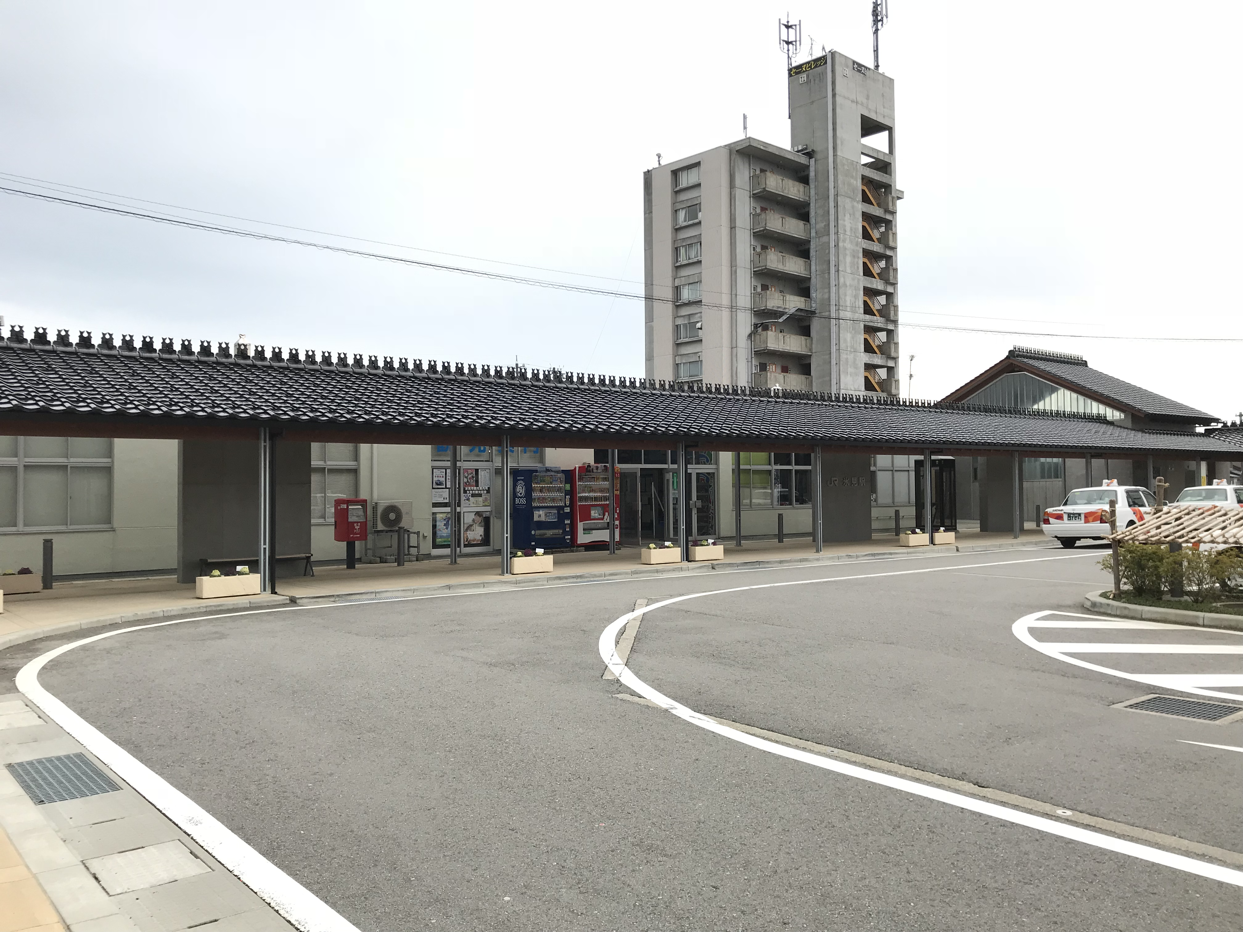 JR西日本氷見線氷見駅の駅舎